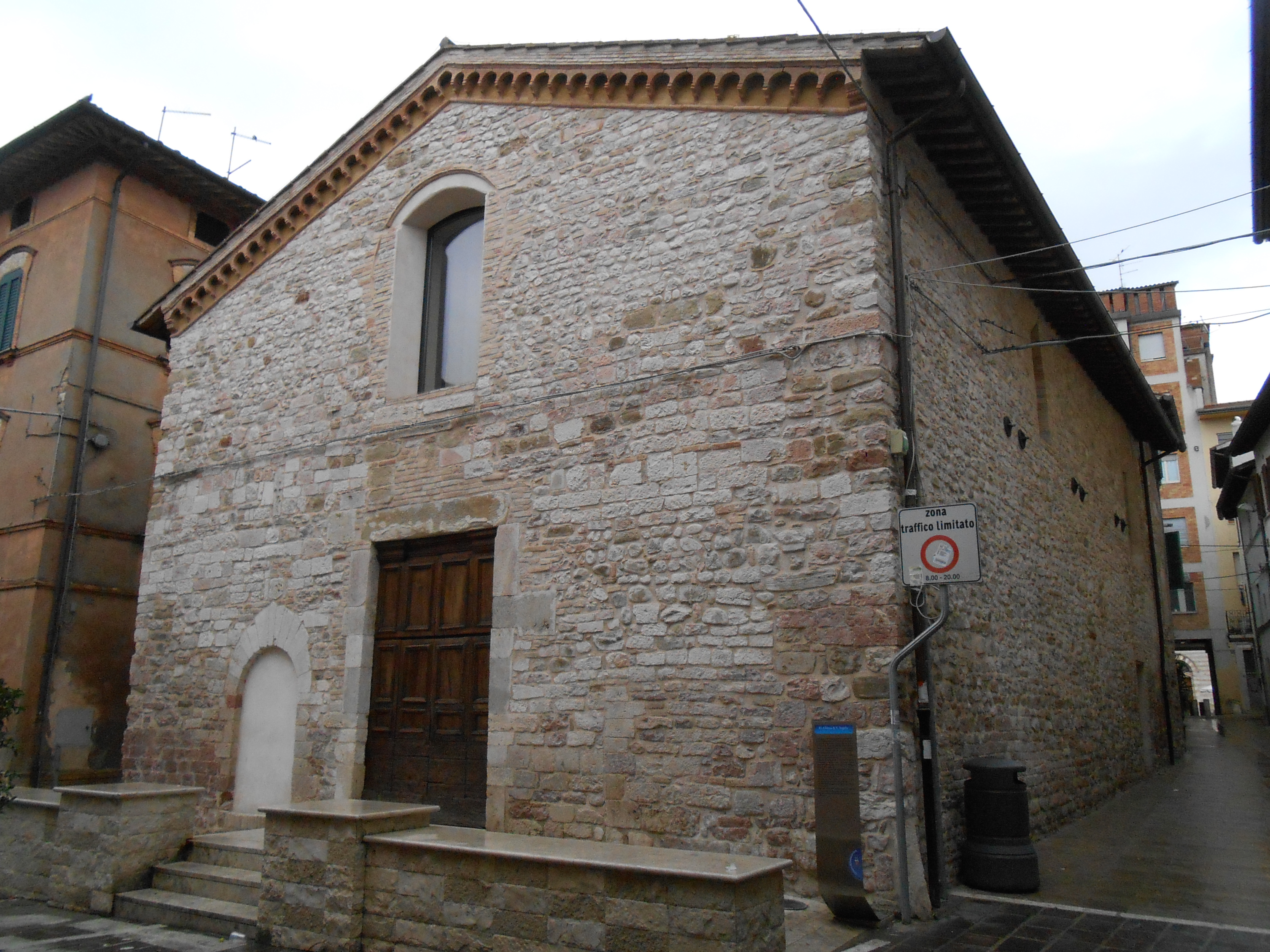 ex chiesa di Sant'Angelo oggi auditorium a Bastia Umbra